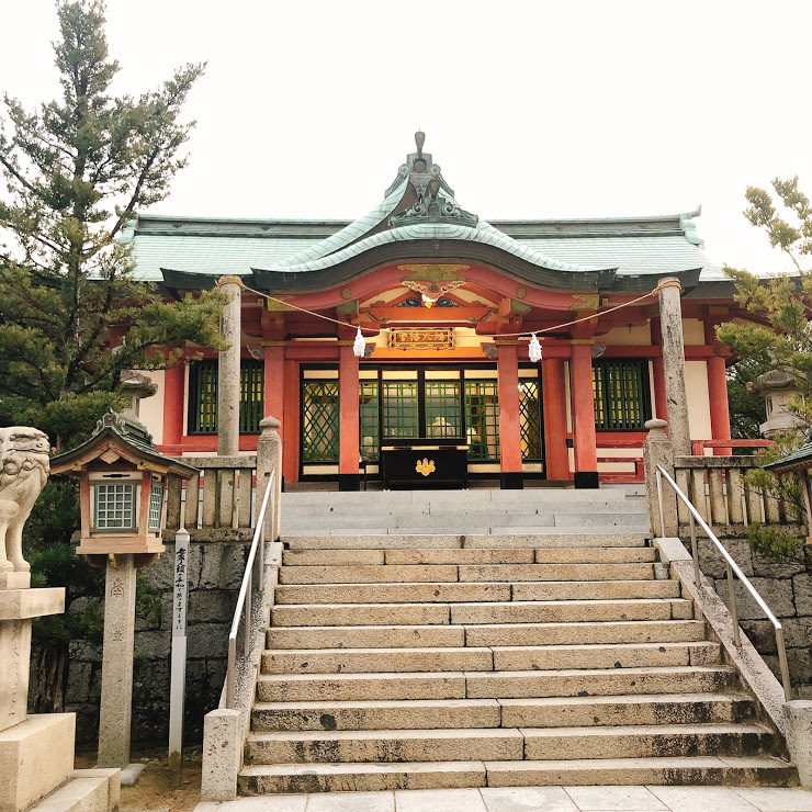 鴻八幡宮拝殿